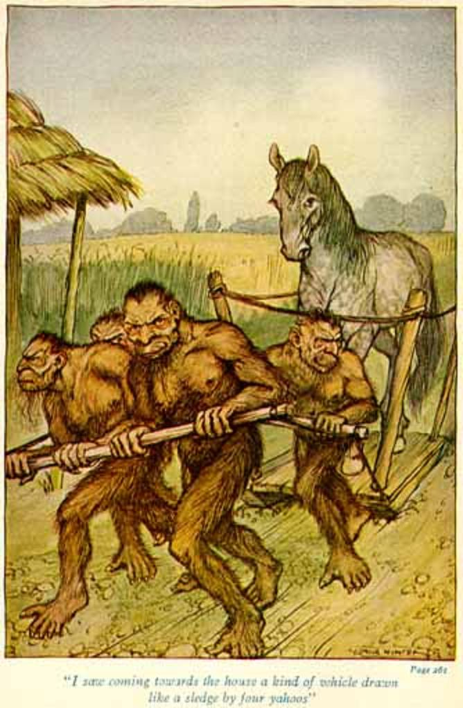 Viagens de Gulliver, Parte III, Capítulo II